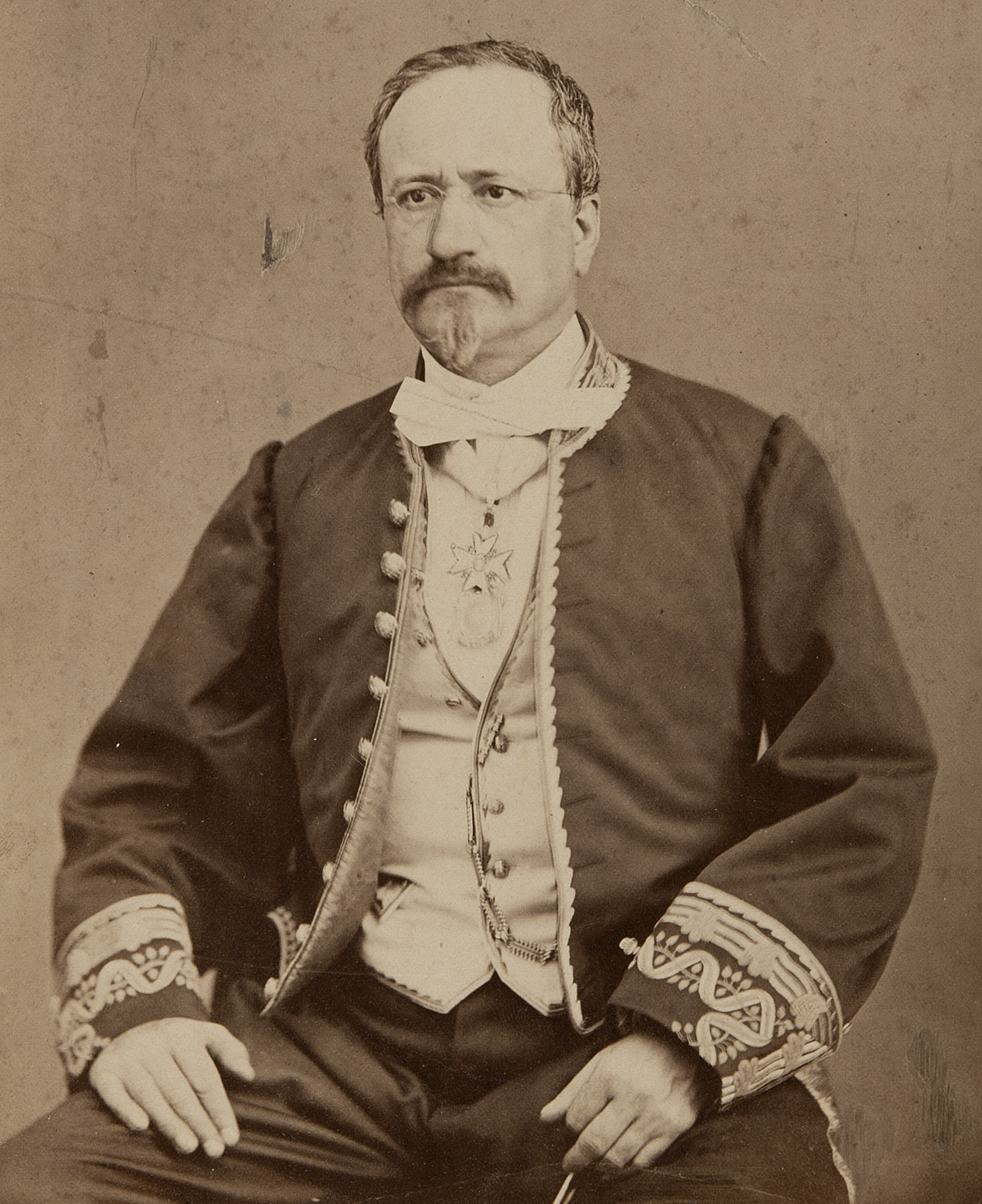 Fotografía de Francisco Jareño y Alarcón